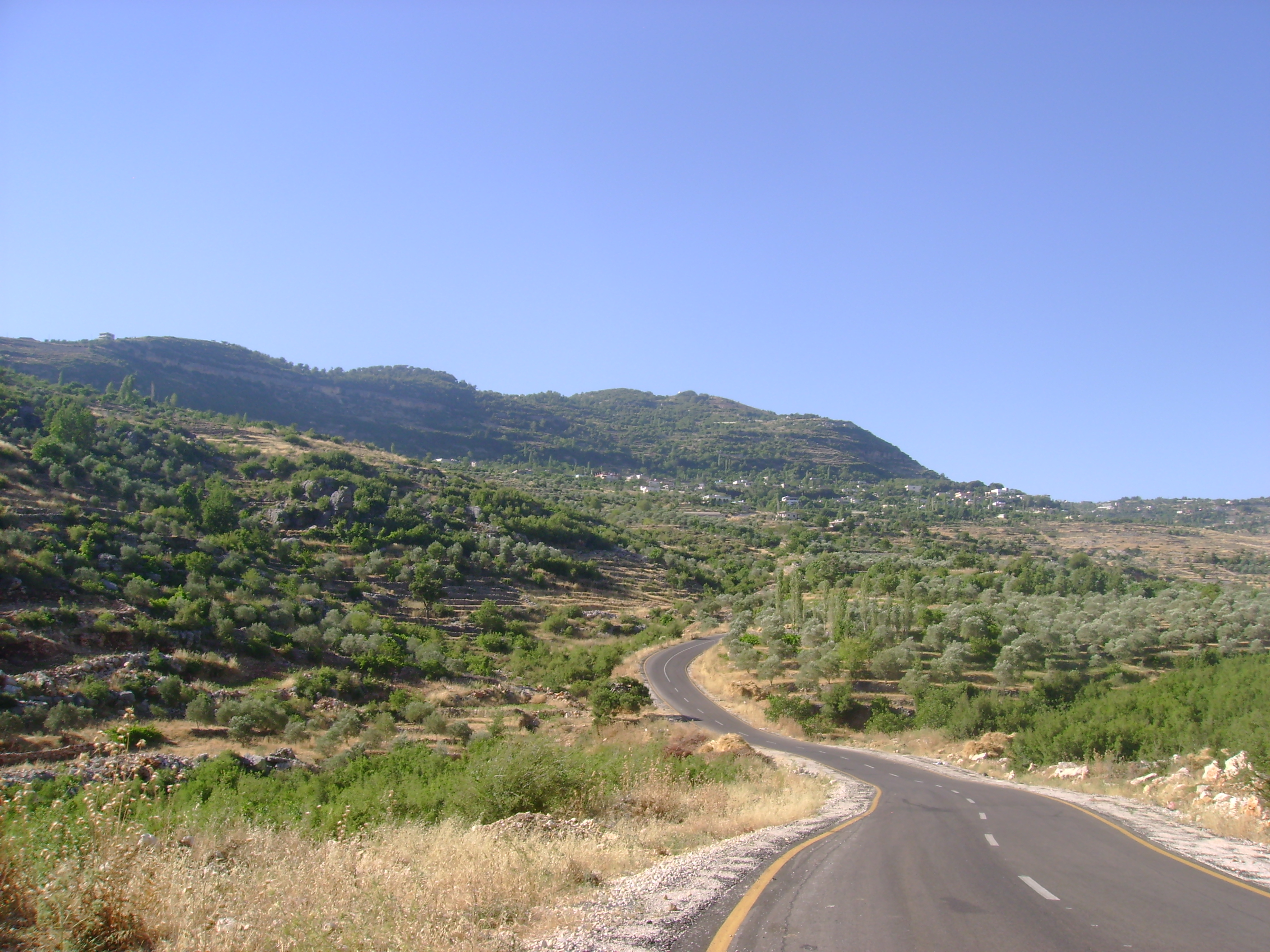 كاف الجاع من عند حجر أبو شاش قديماً